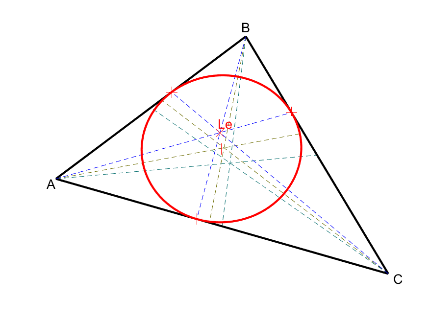 Un triangle et son ellipse de Brocard, représenté avec son point de Brianchon, le point symédian.